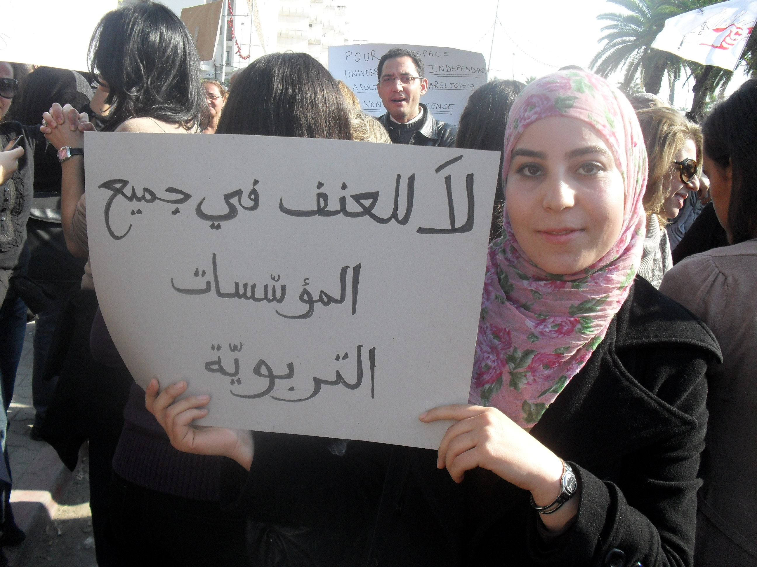 A student holds an anti-violence sign at a protest this week in Tunis. أحد الطلبة يرفع لافتة ضد العنف خلال احتجاج هذا الأسبوع في تونس العاصمة. Un étudiant brandit une banderole prônant la non-violence lors d'une manifestation organisée cette semaine à Tunis.